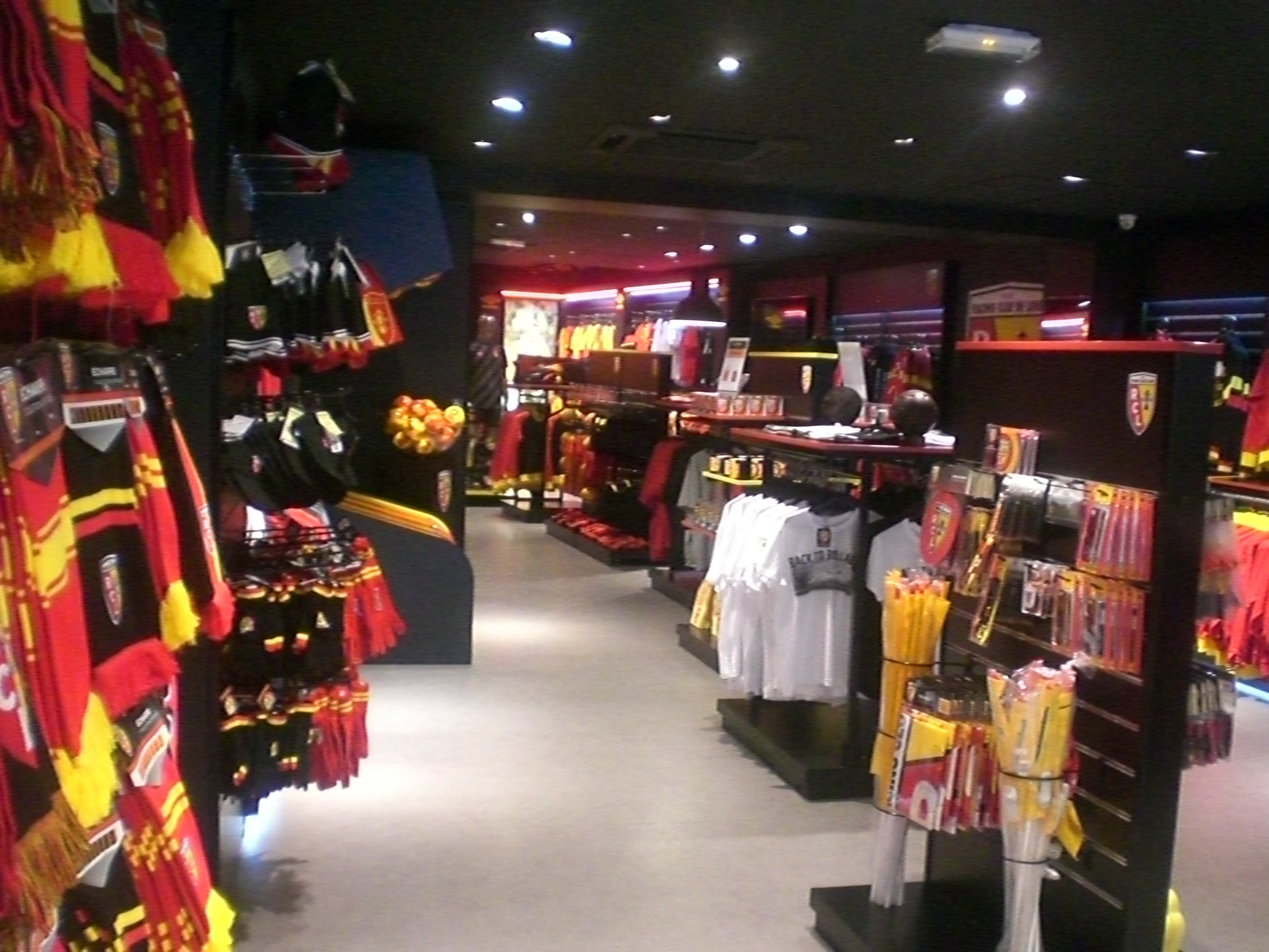 Boutique Emotion Foot City à Lens, en septembre 2015.